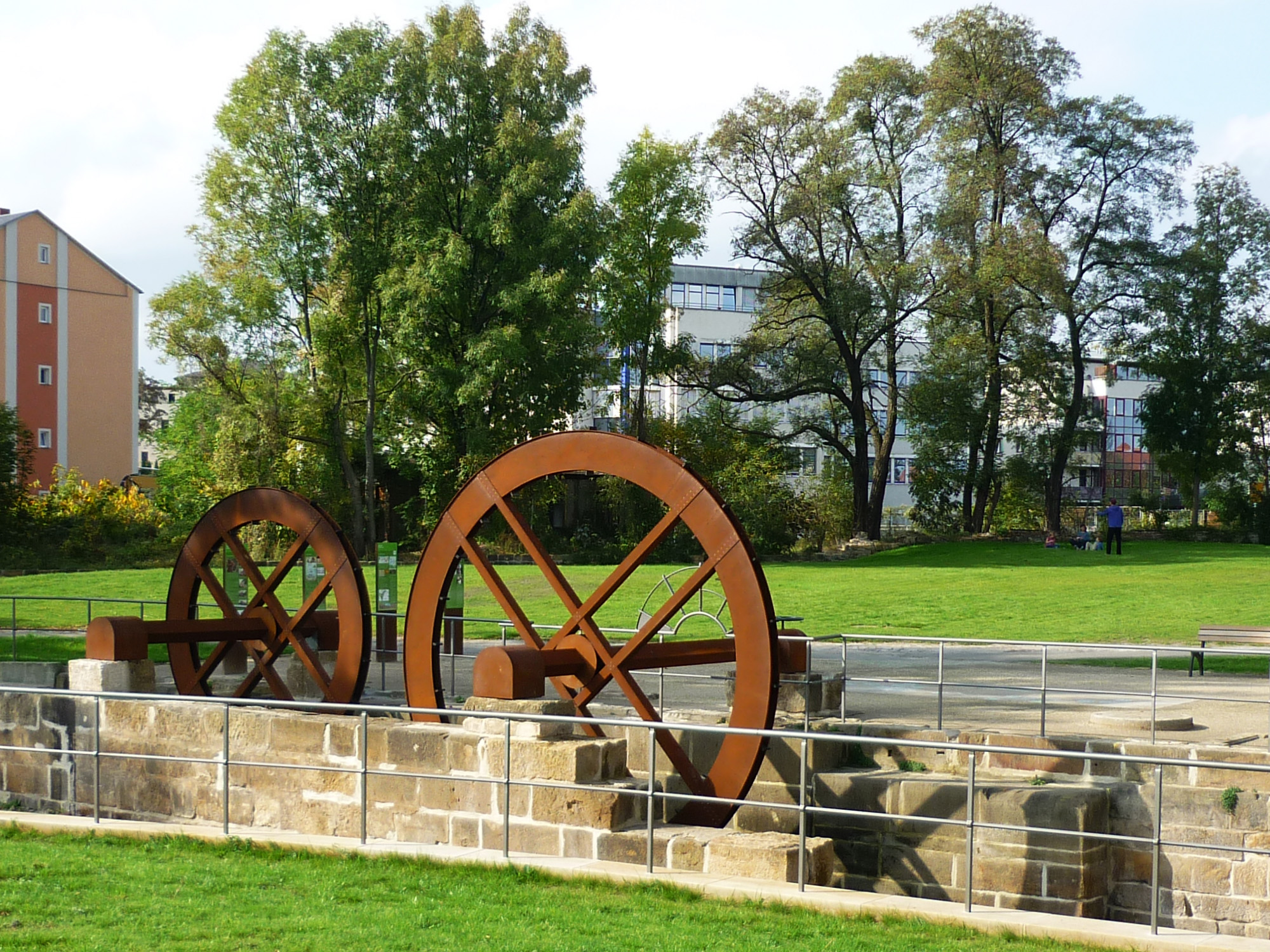 Der neue "Pulvermühlenpark" zwischen Oederaner Straße und Fabrikstraße in Dresden-Löbtau auf dem Gelände der ehemaligen Pulvermühle. Zwei Silhouettenmühlräder am ehemaligen Weißeritz-Mühlgraben veranschaulichen den Standort der alten kurfürstlichen Pulvermühle.